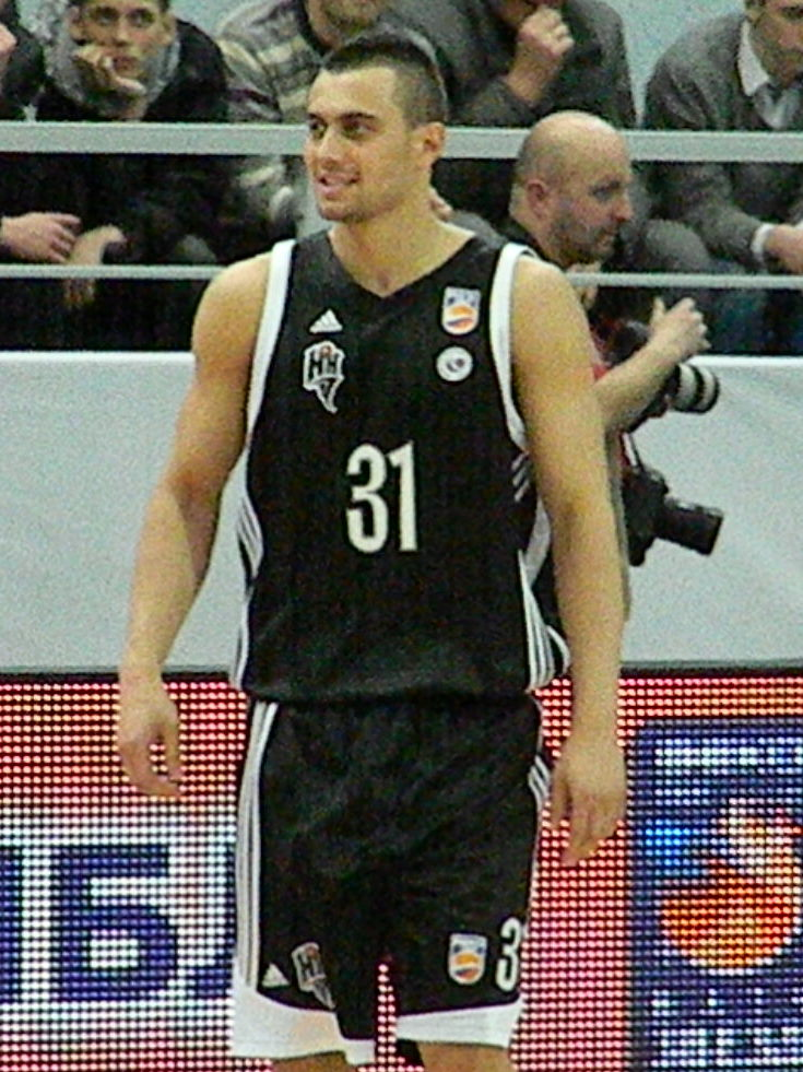 Ivan Paunić, serbian Basketball player, at all-star PBL game 2011